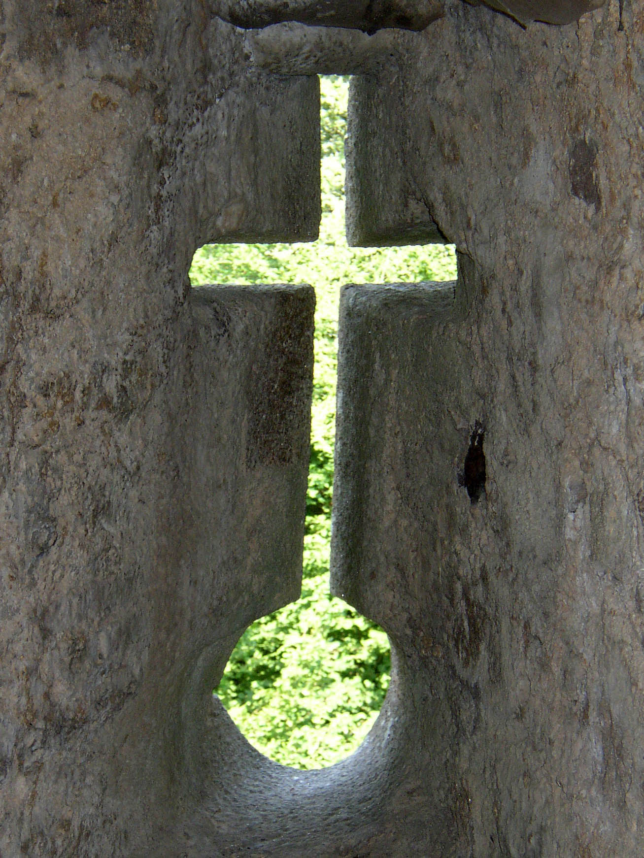 Castelo de Stanta Maria da Feira This file was uploaded for Wiki Loves Monuments in Portugal with the unique identifier 70478. This monument is classified as Monumento Nacional. This building is classified as Monumento Nacional. Object location40° 55′ 15.2″ N, 8° 32′ 33.61″ W